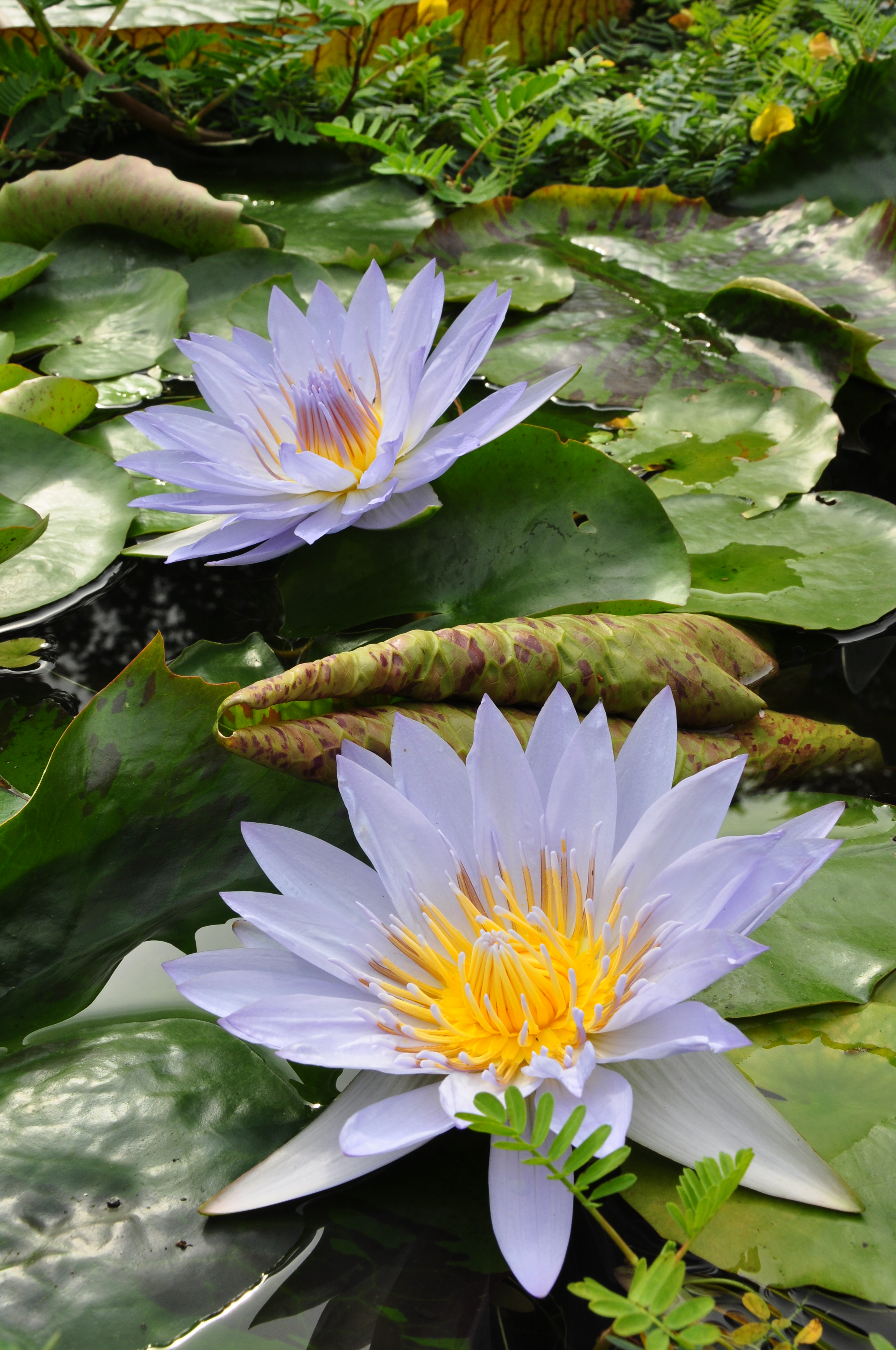 Botanischer Garten der Universität Zürich in Zürich-Weinegg (Switzerland) : Nymphaea